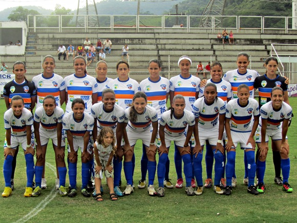 Time do Duque de Caxias/CEPE campeão da Copa do Brasil de 2010